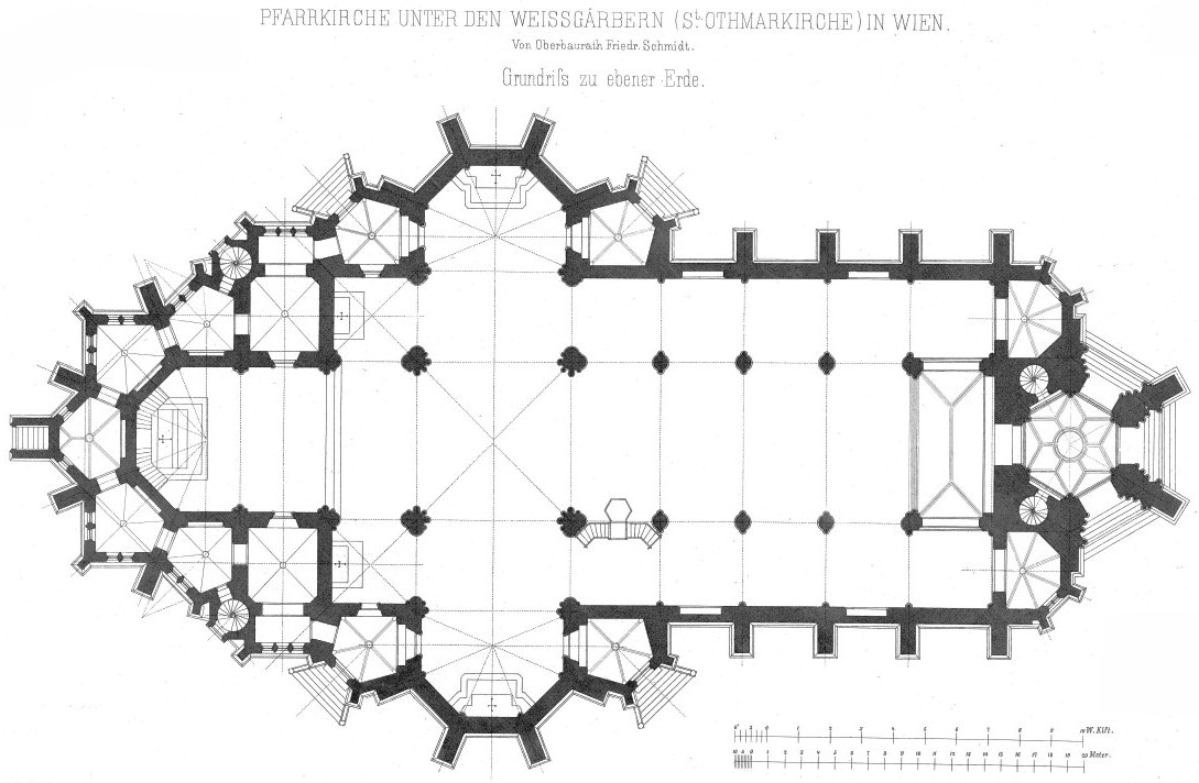 St. Othmar unter den Weißgärbern. Grundriss zu ebener Erde